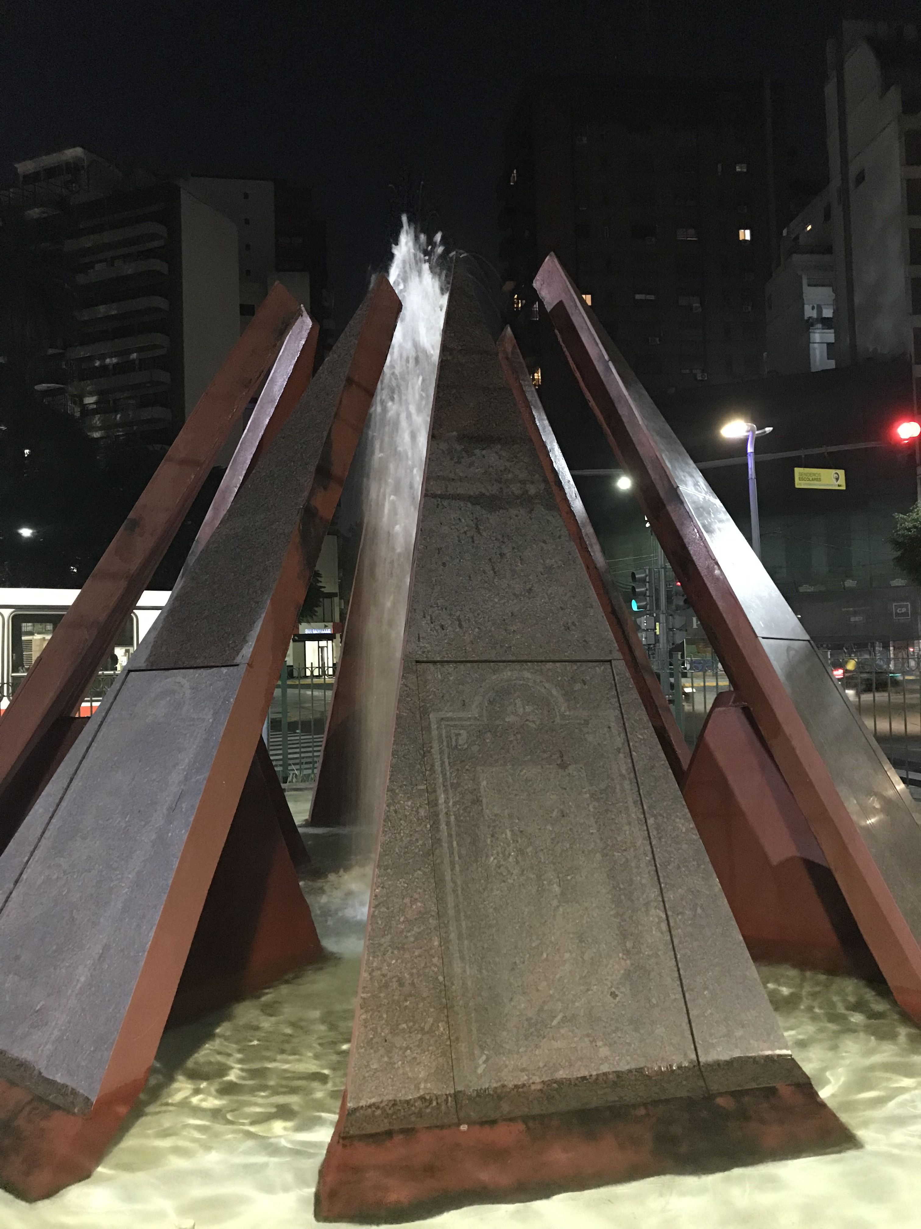 Imagen de la fuente ubicada en la Plazoleta Ararat, espacio dedicado a la conmemoración de la comunidad armenia en Argentina.